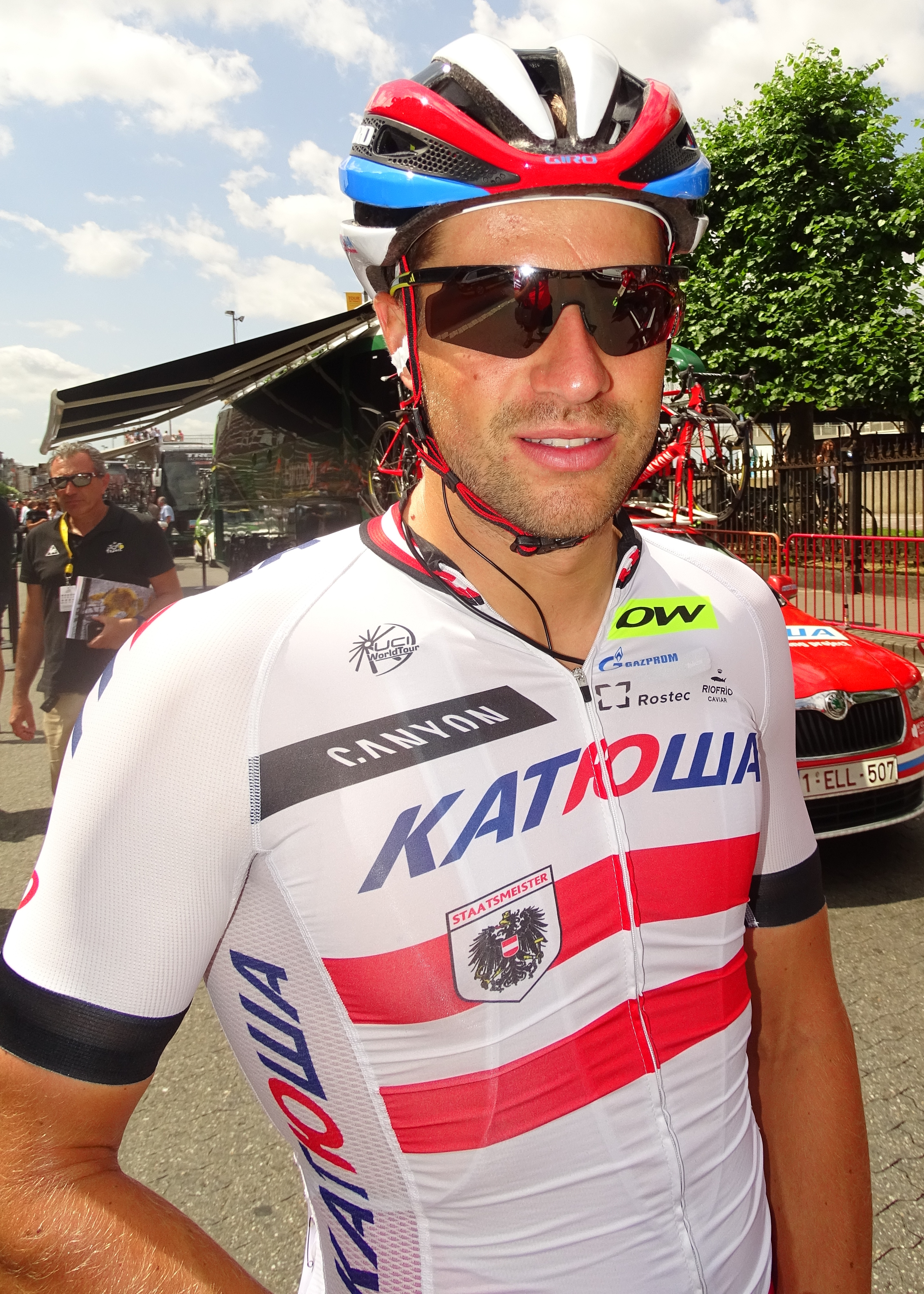 Reportage réalisé le lundi 6 juillet à l'occasion du départ de la troisième étape du Tour de France 2015 à Anvers, Belgique.